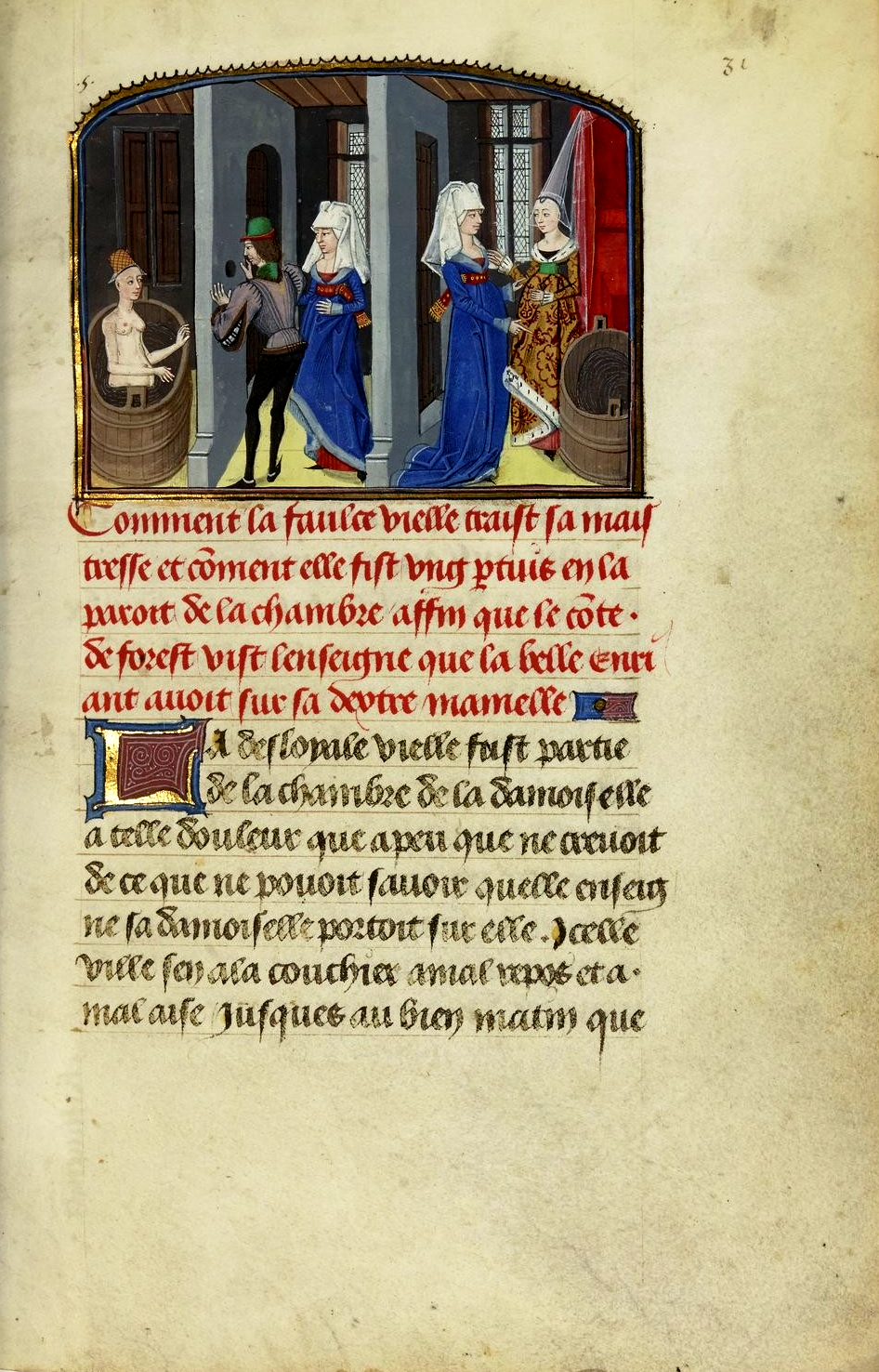 Extrait du Livre de Gerard de Nevers - Bibliothèque nationale France - Lyoset Liedet et Guyot d'Augerans